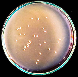 DEL-teszt plate